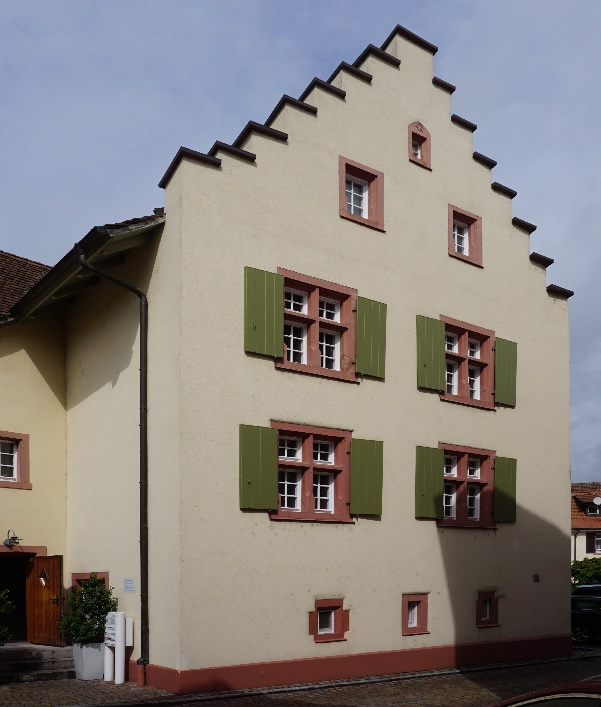 Vogtshaus Steinen